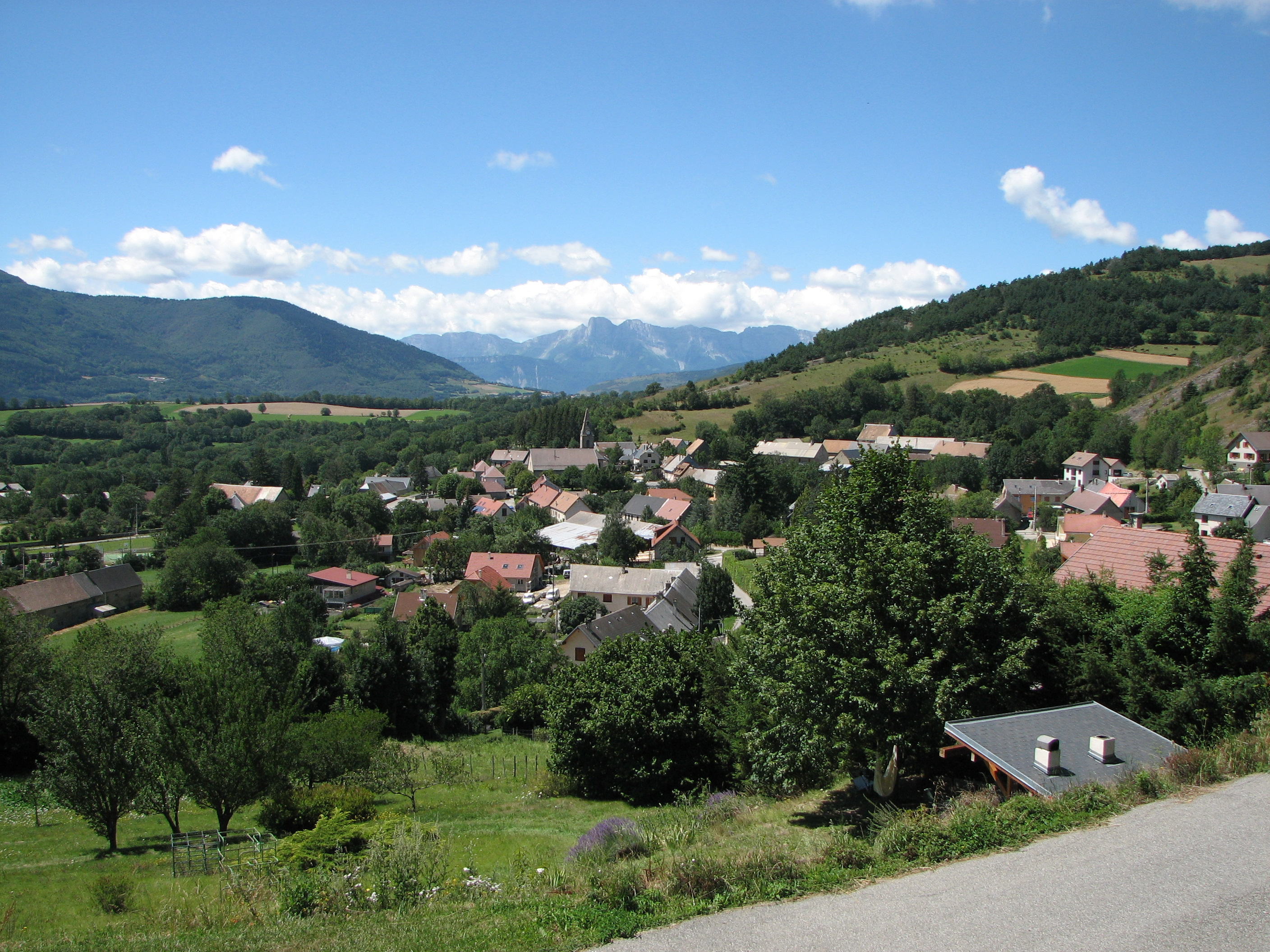 Nantes-en-Ratier (Isère)